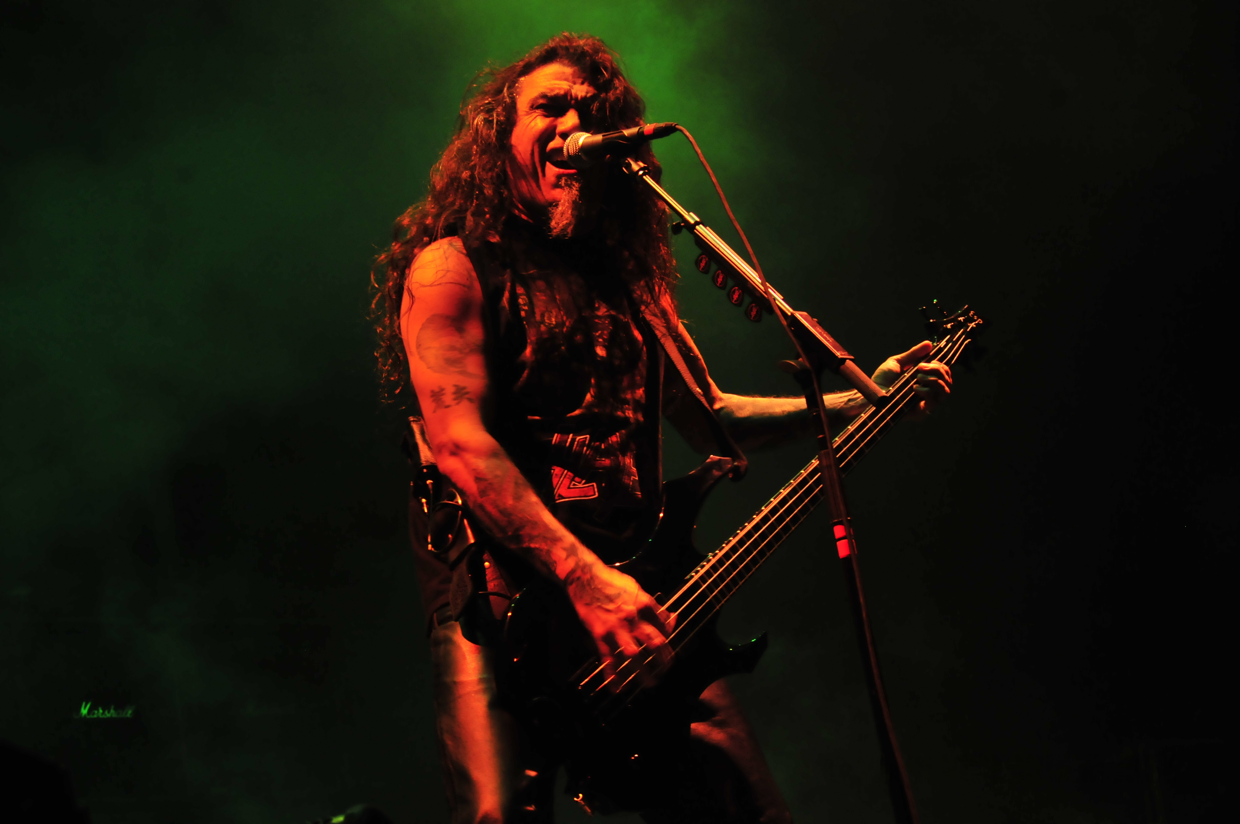 Tom Araya con gli Slayer al Mayhem Fest di Hartford